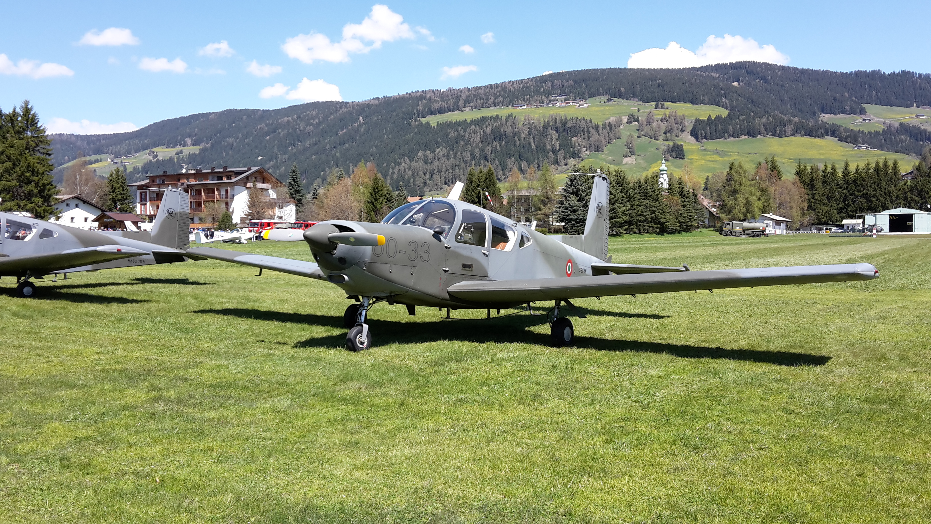 S-208M a Dobbiaco